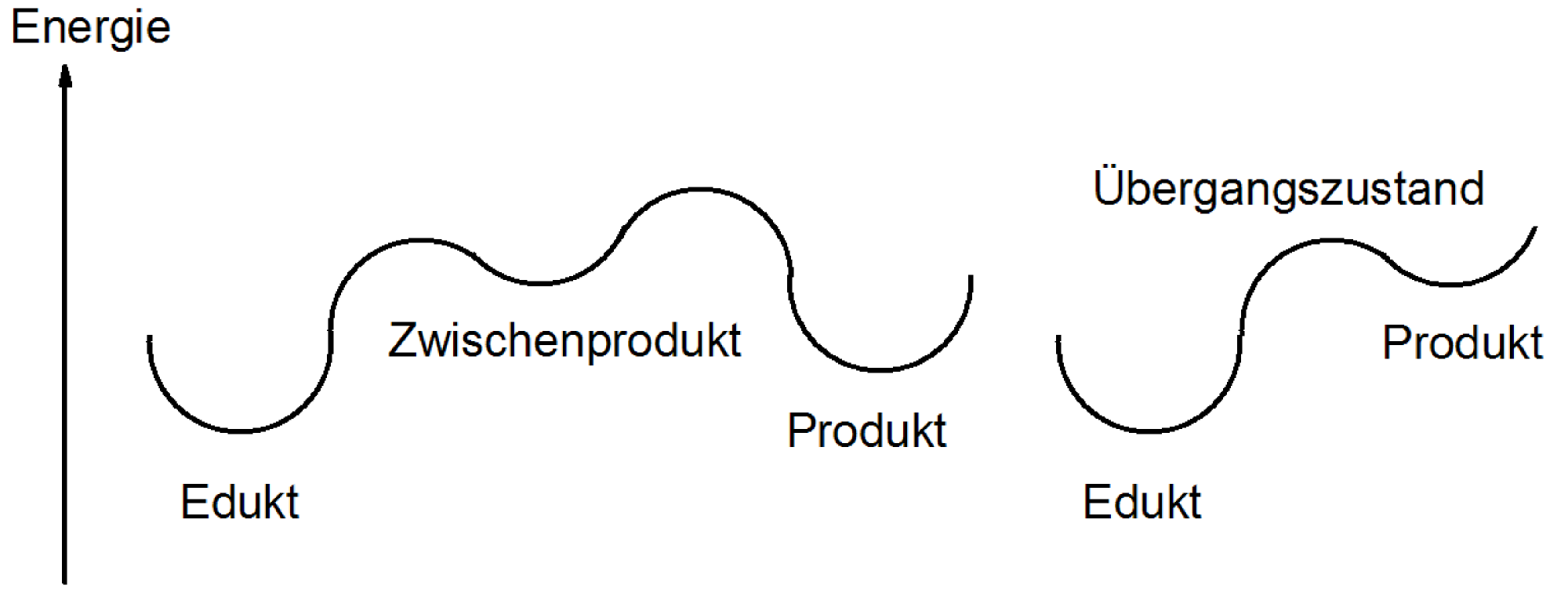 Übergangszustand